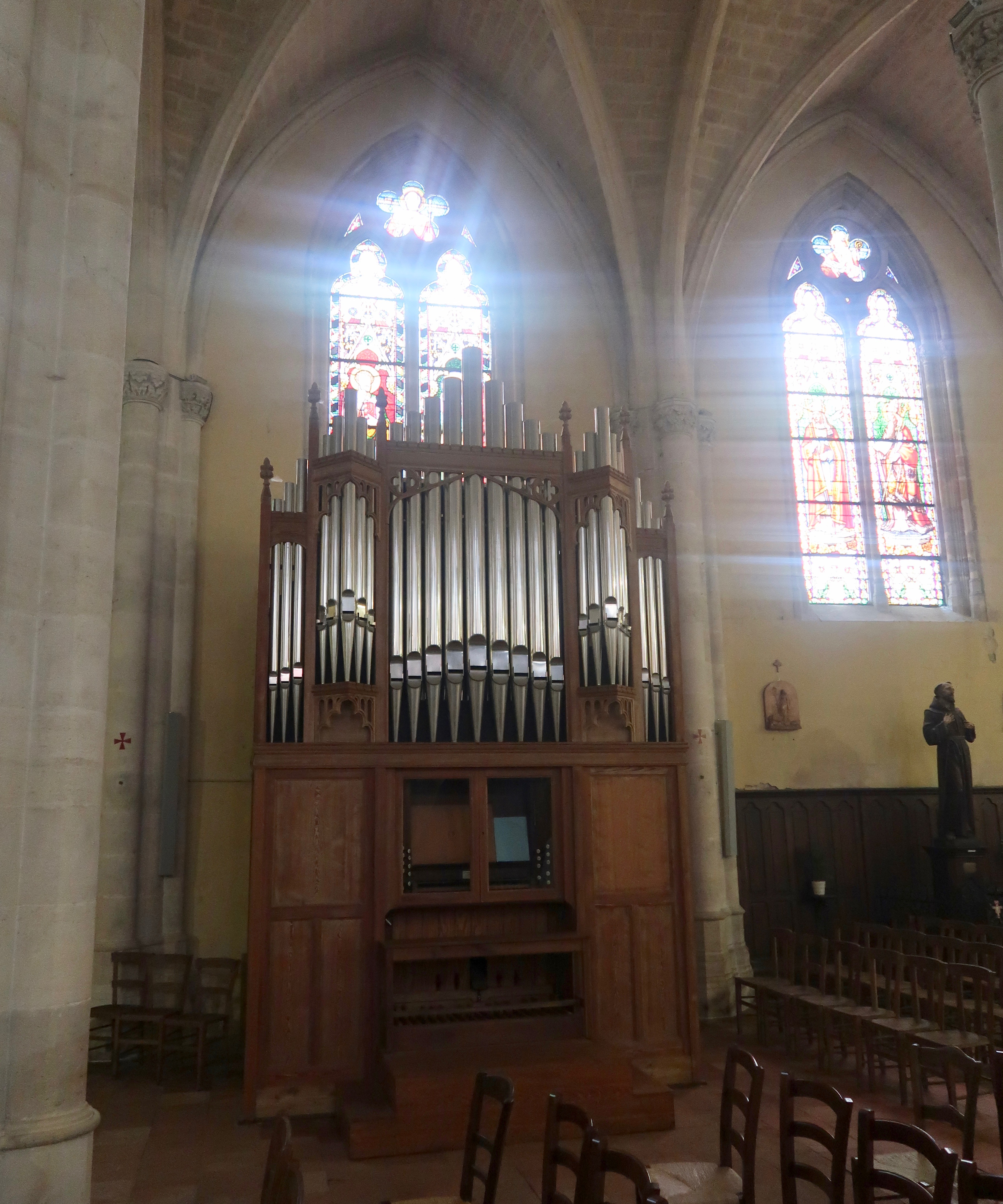 Orgue de l'église Notre-Dame de Sainte-Foy-la-Grande (Gironde).